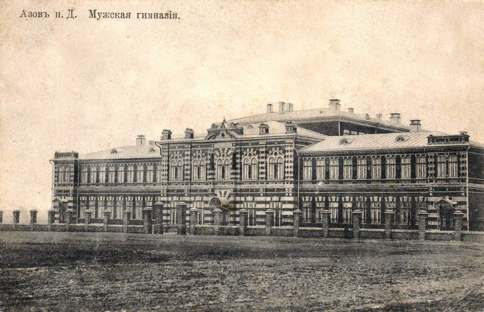 Здание мужской гимназии г. Азова. Фото начала XX века.